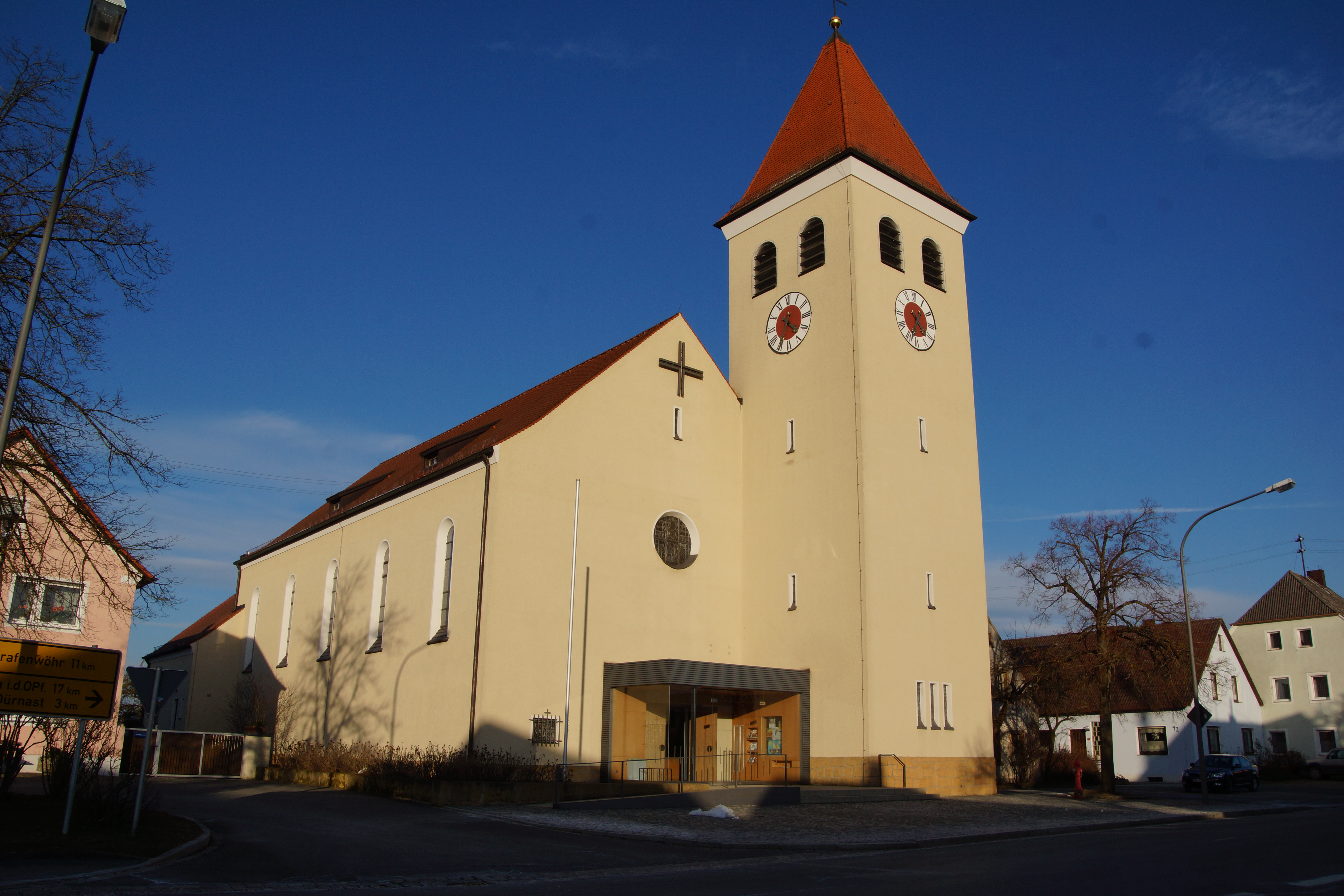 Die neue, 1932 errichtete, katholische Pfarrkirche St. Martin in Kaltenbrunn bei Weiherhammer.